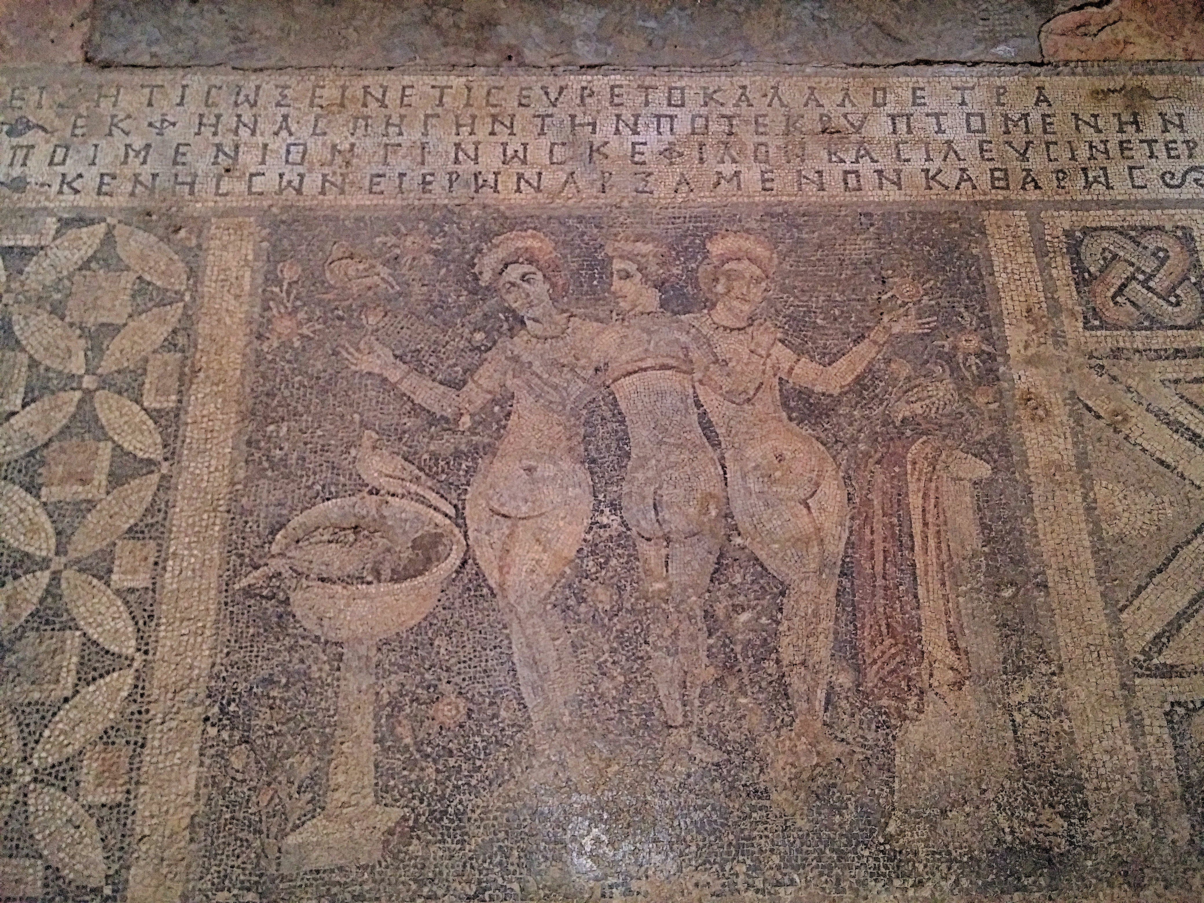 Narlıkuyu Mozaik Müzesi içerisindeki Üç Güzeller mozaiği.